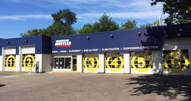 Atelier Monsieur Muffler St-Vincent-de-Paul à Laval